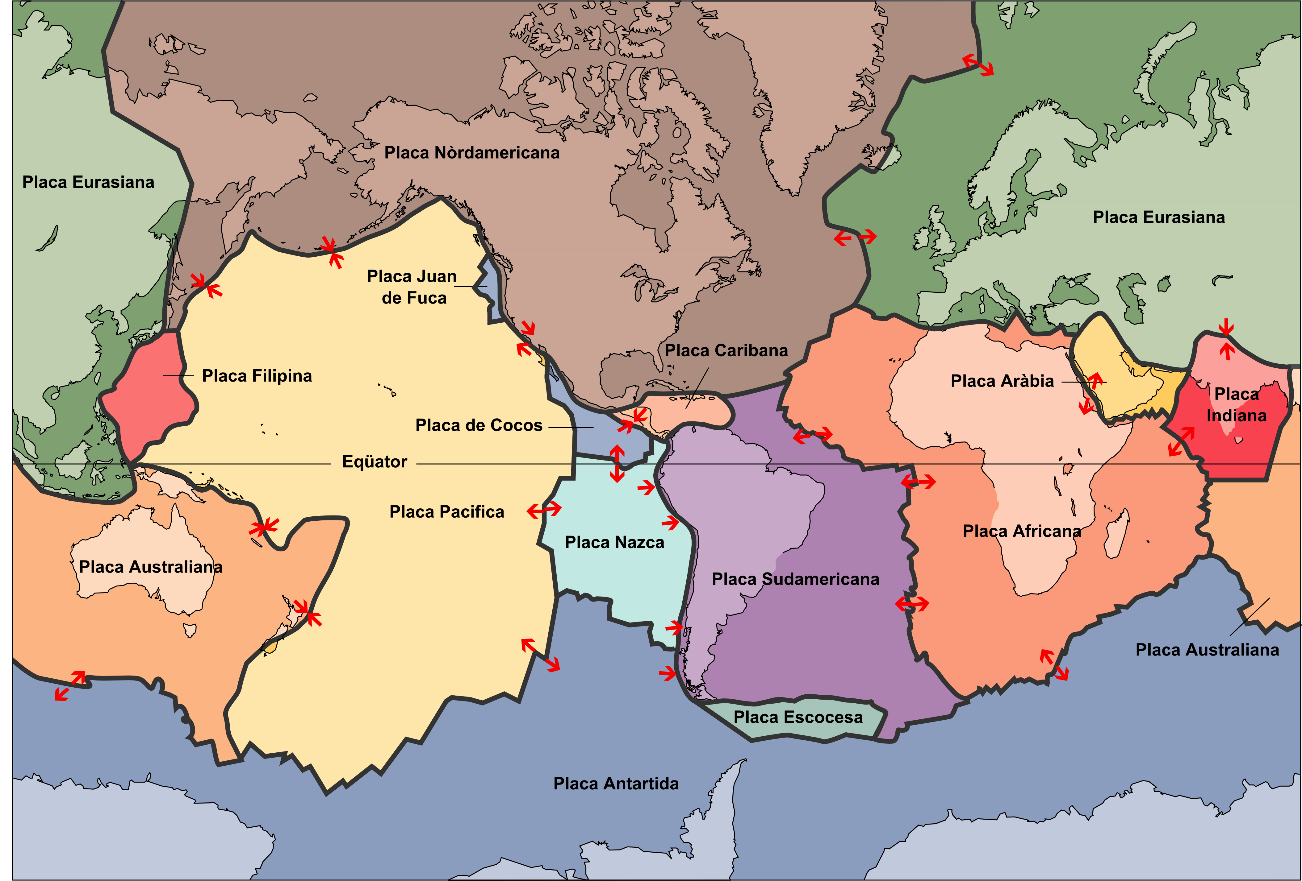 Version occitana de .